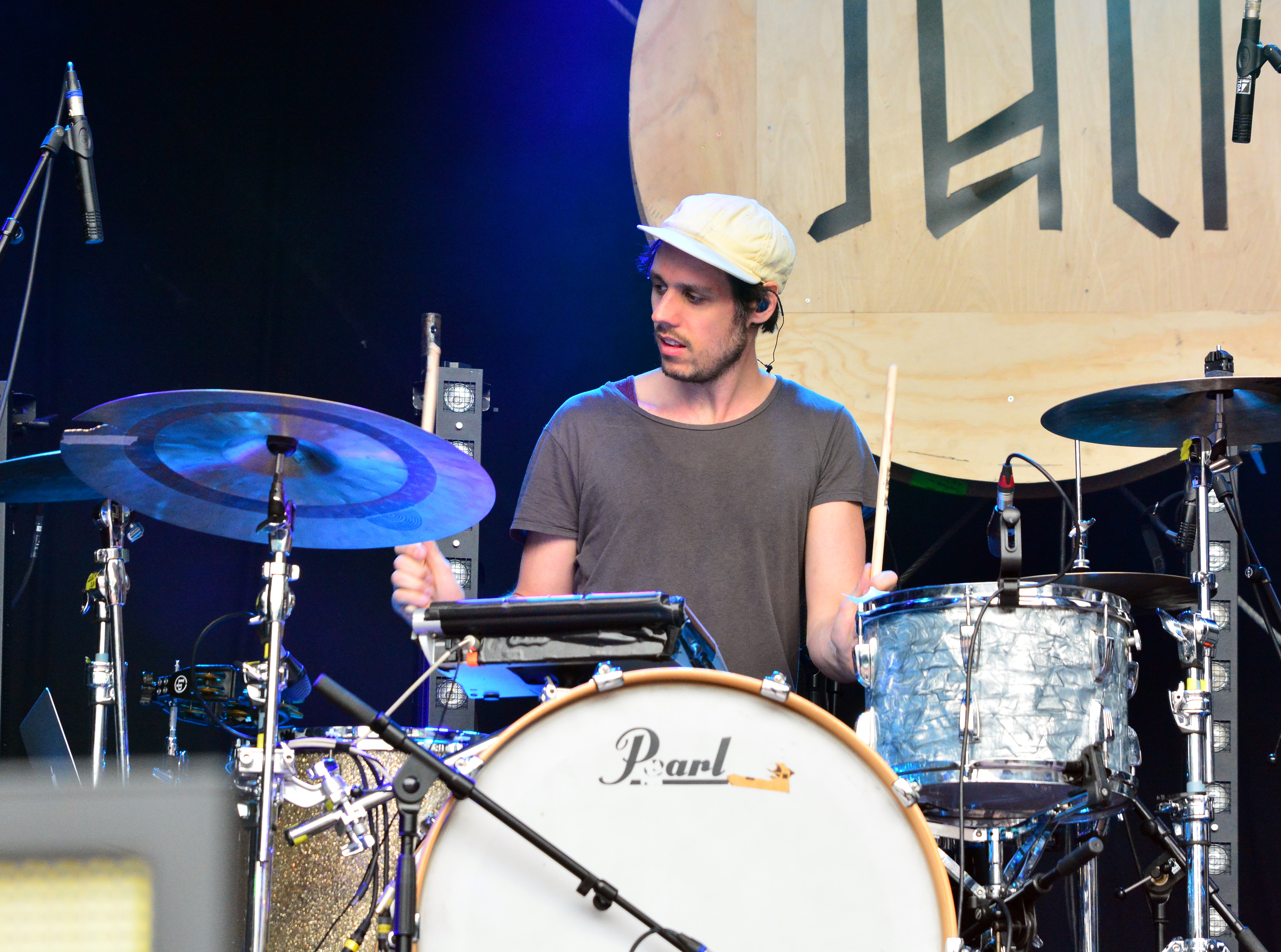 Juli beim „Holsten Brauereifest 2015“ in Hamburg